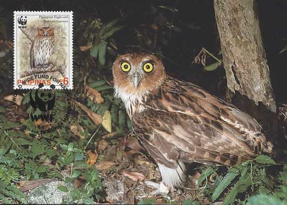 Bubo philippensis